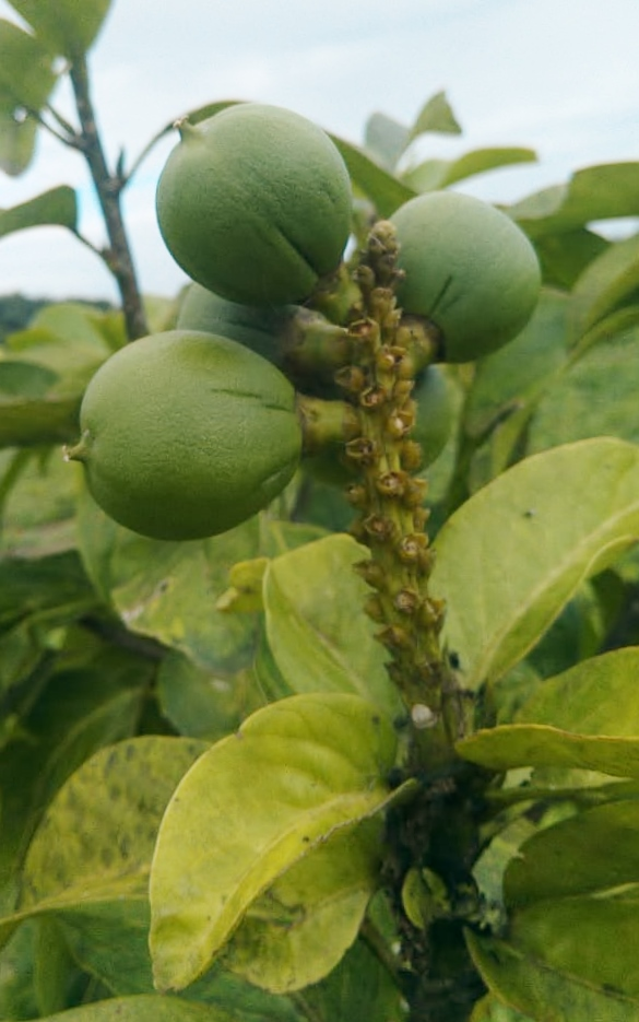 Frutos de Cacay inmaduros